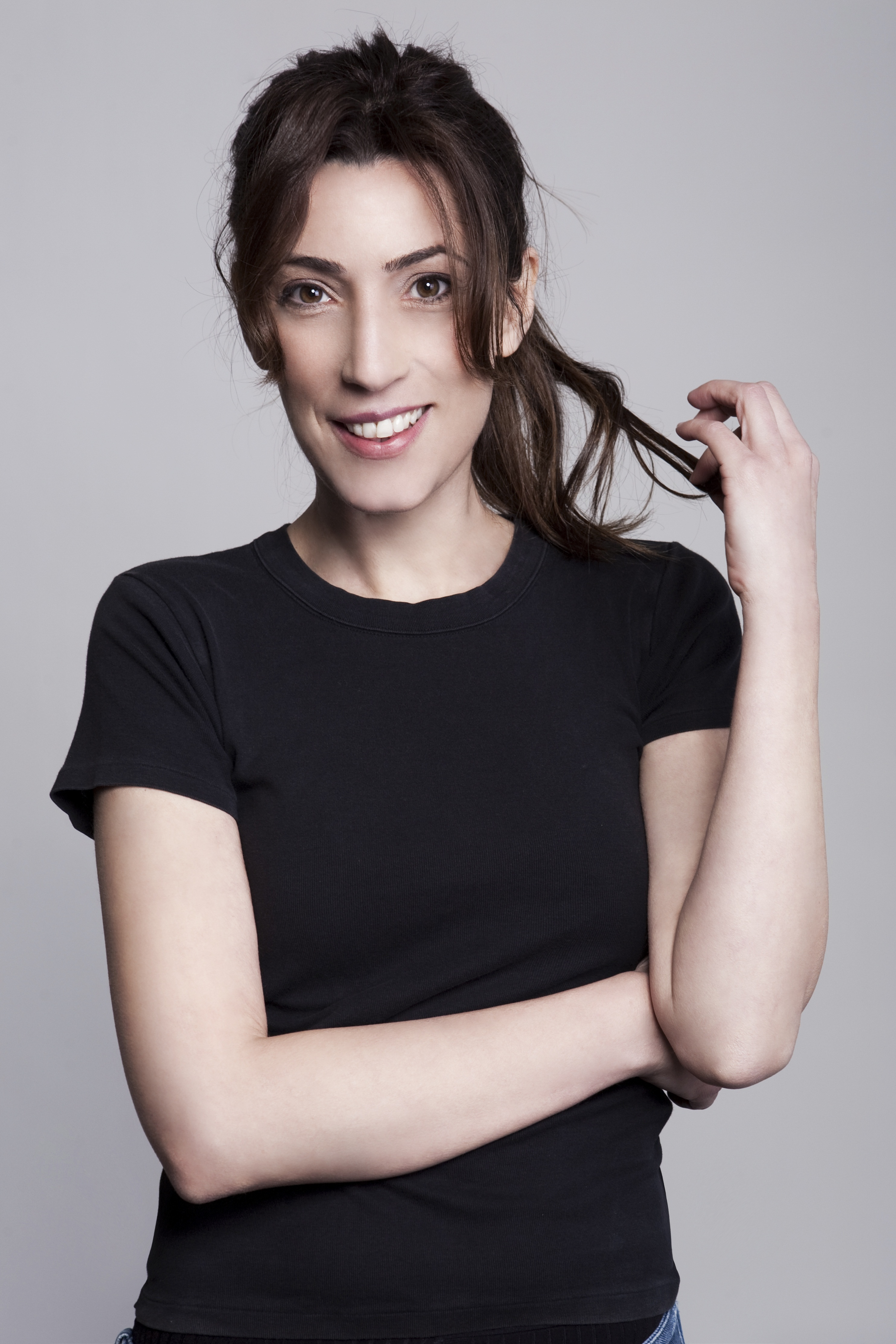 אירית סוקי